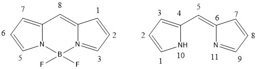 Numeración